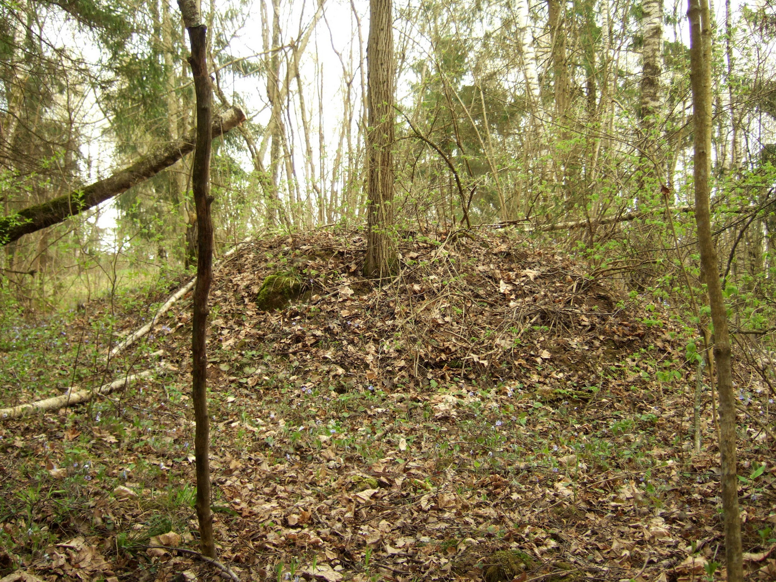 Aukštųjų Rusokų pilkapynas